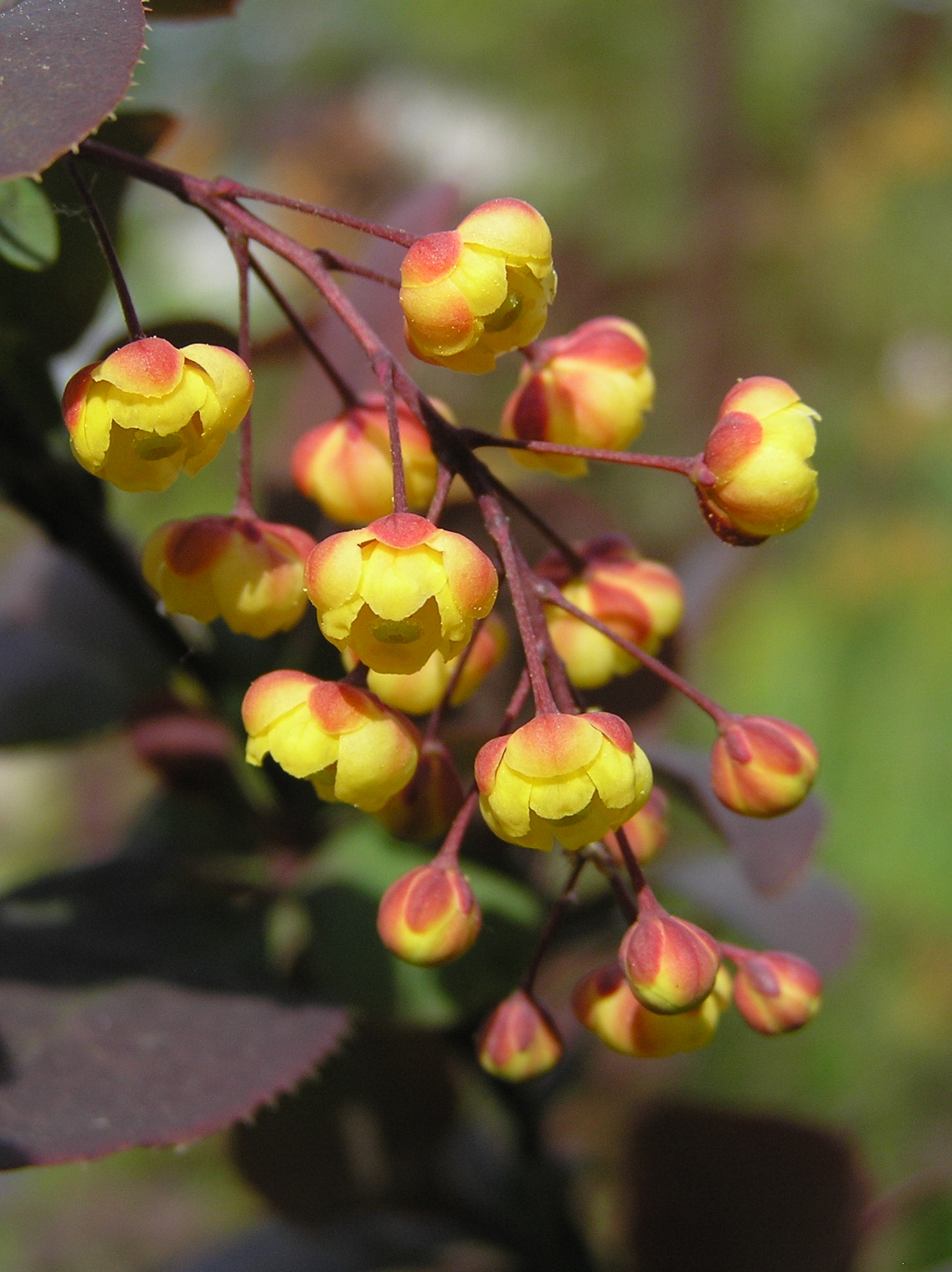 Berberis thunbergii, Berberys Thunberga, Białowieża, Polska